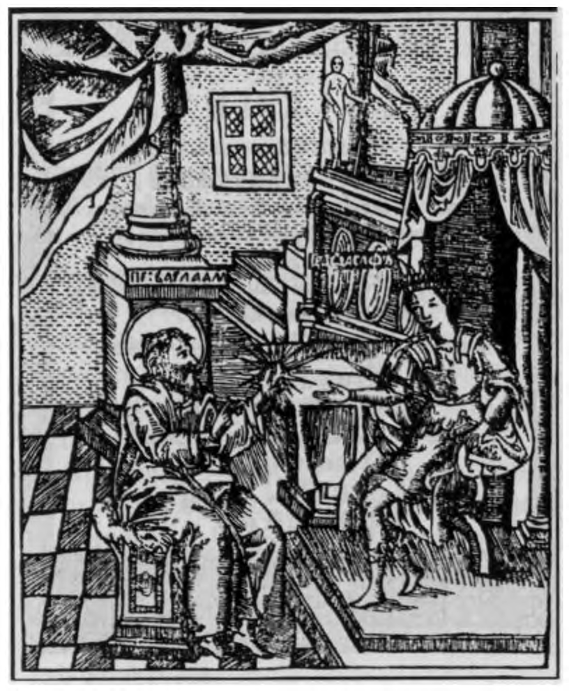 Иллюстрация из книги «Варлаам и Иоасаф». Кутеинская типография. 1637.